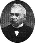 Leopold Bogumił Szyller, or Leopold Bogumił Szyller - Racki (1831-1917)